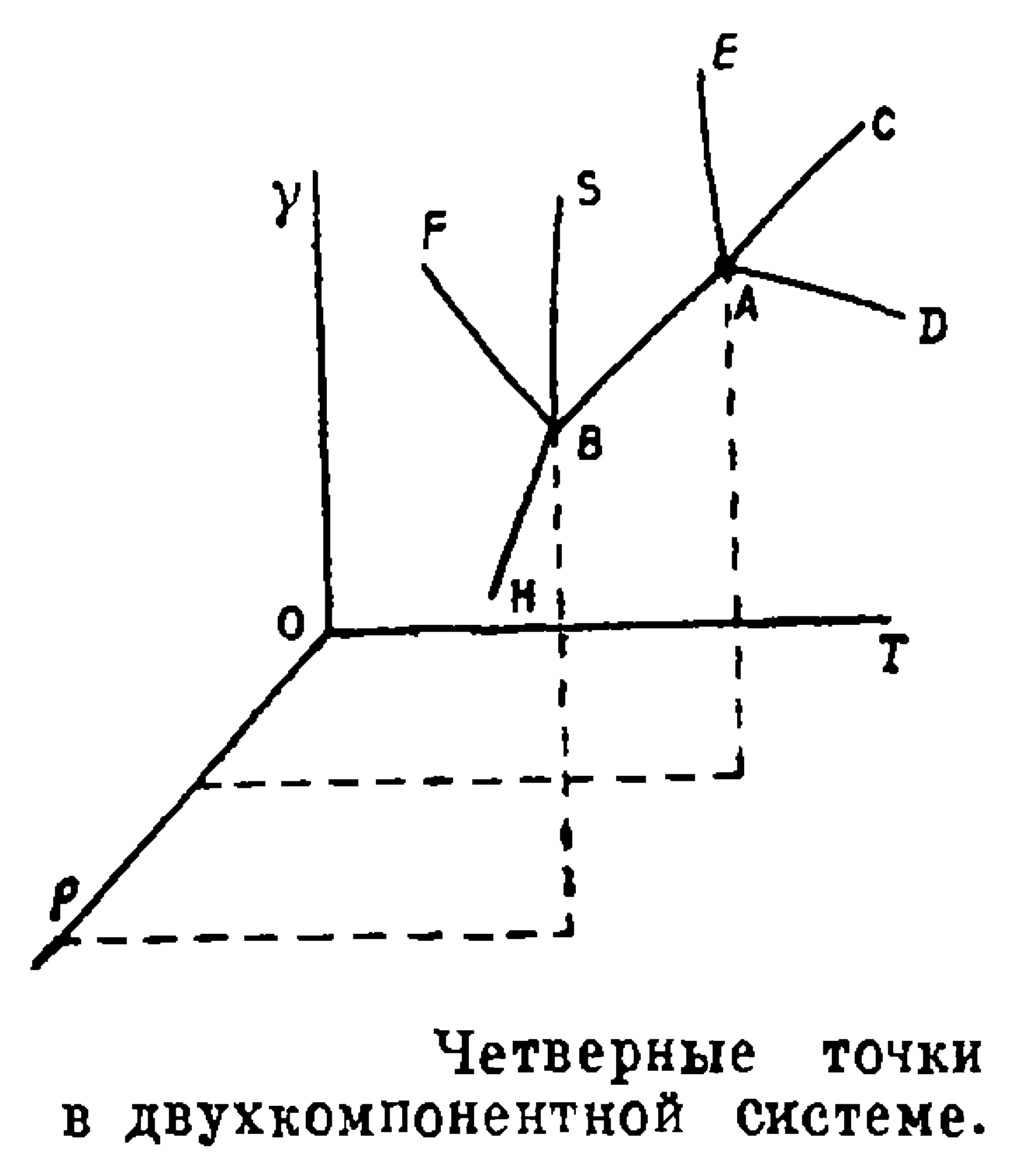 Четверные точки в двухкомпонентной системе. Р — давление, Т — температура, γ — концентрация раствора; А — четверная точка в системе раствор — соль — лёд — пар, В — четверная точка в системе раствор — соль безводная — твёрдый кристаллогидрат — лёд (или вместо льда пар)